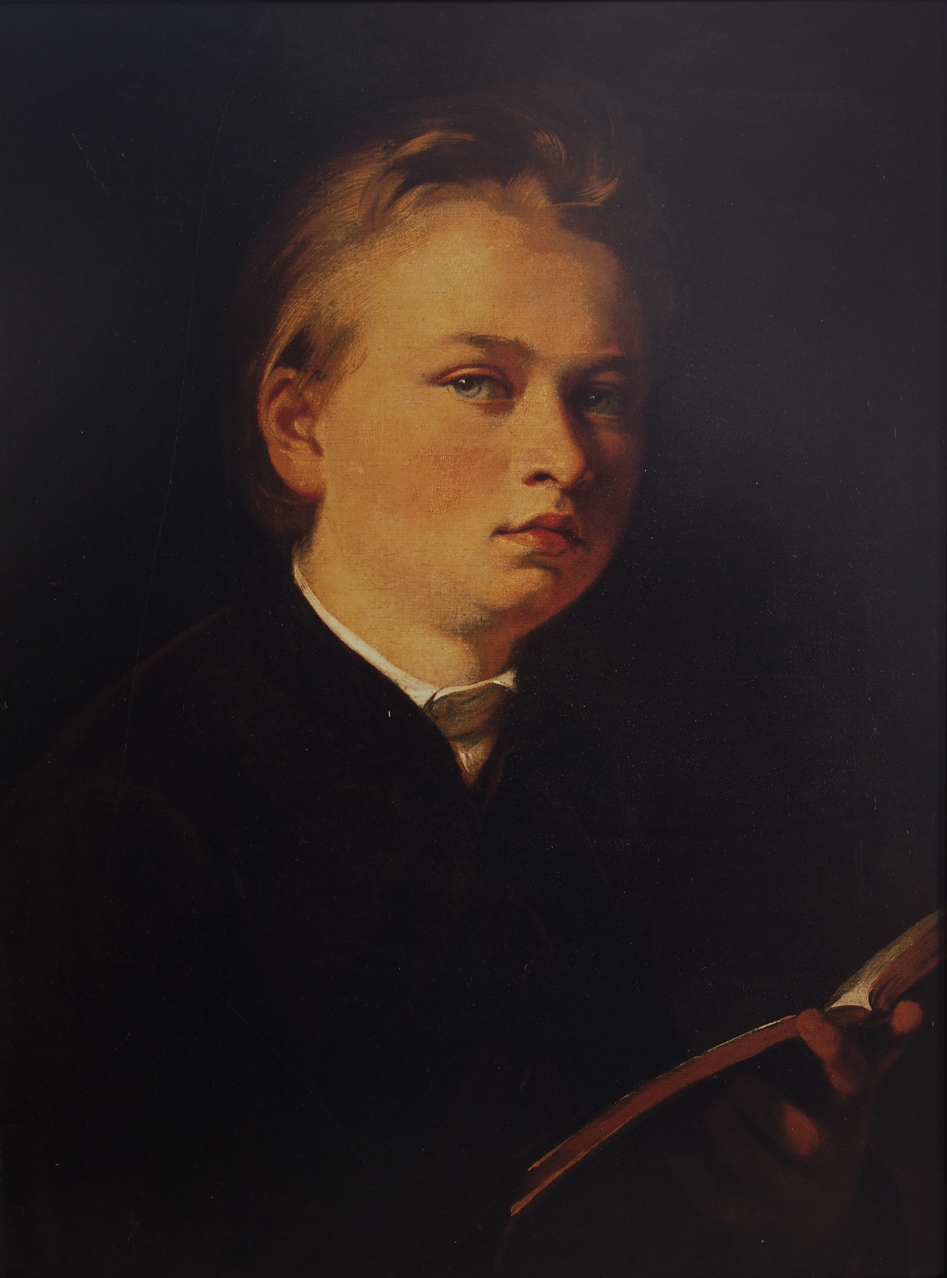 Porträt Karl Scholl (1840-1912), Bildhauer, Werk von Johann Baptist Scholl der Jüngere